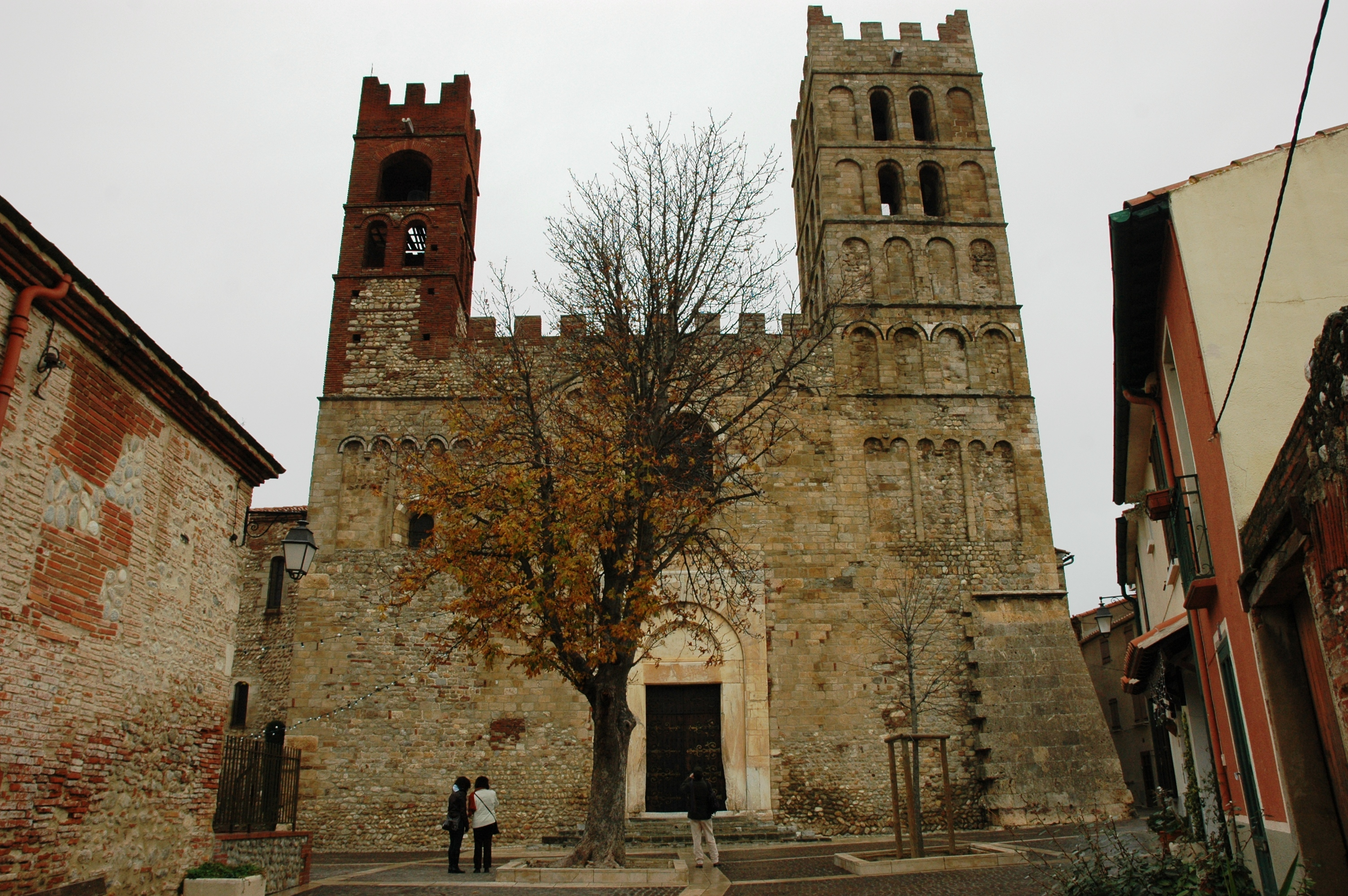 Catedral d'Elna - Façana